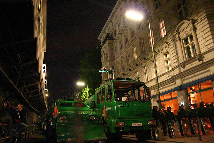 Polizei am U-Bahnhof Görlitzer Bahnhof, 1. Mai 2004 in Berlin-Kreuzberg